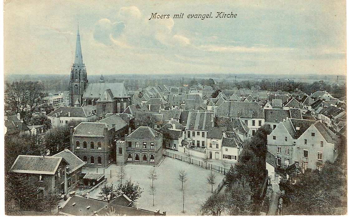 Bild der Moerser Altstadt von der Katholischen Kirche aus. Aufnahme zeigt an der Evangelischen Kirche den Anbau des Gymnasiums Adolfinum Moers, der 1899 abgerissen wurde. Von Postkarte gescannt, Lutz Hartmann, 21.5.2006